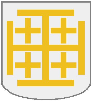 Middeleeuws wapen